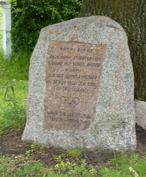 Gedenkstein für Ludwig Stubbendorff und sein Pferd Nurmi an der Nurmi-Eiche auf dem Gelände der Verdener Rennbahn